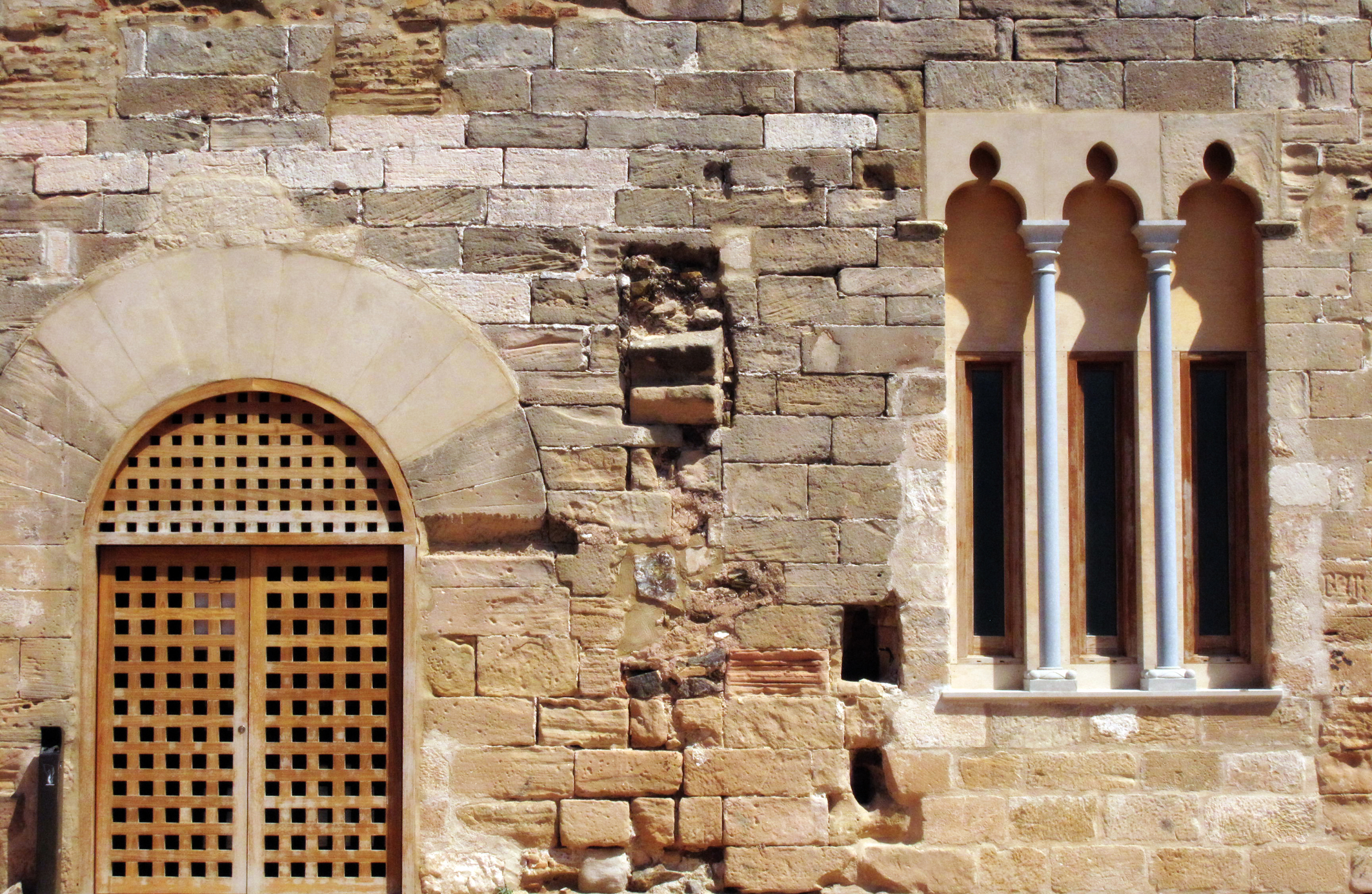 Castell de Falset